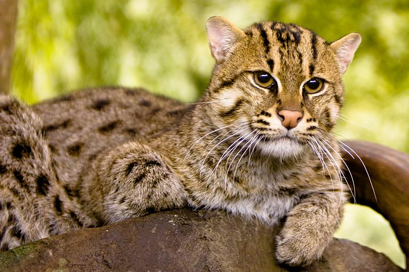 Portrait d'un Chat pêcheur (Prionailurus viverrinus) au zoo de Cincinnati.